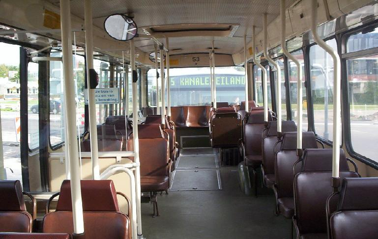 Interieur csa2